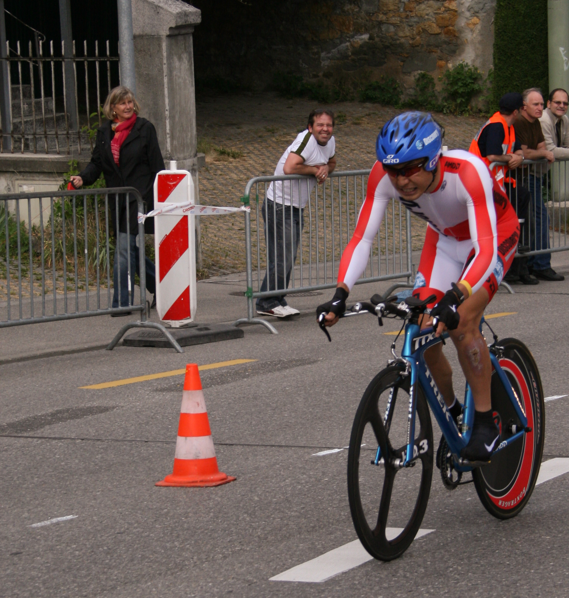 Fumiyuki Beppu prologue du Tour de Romandie 2007